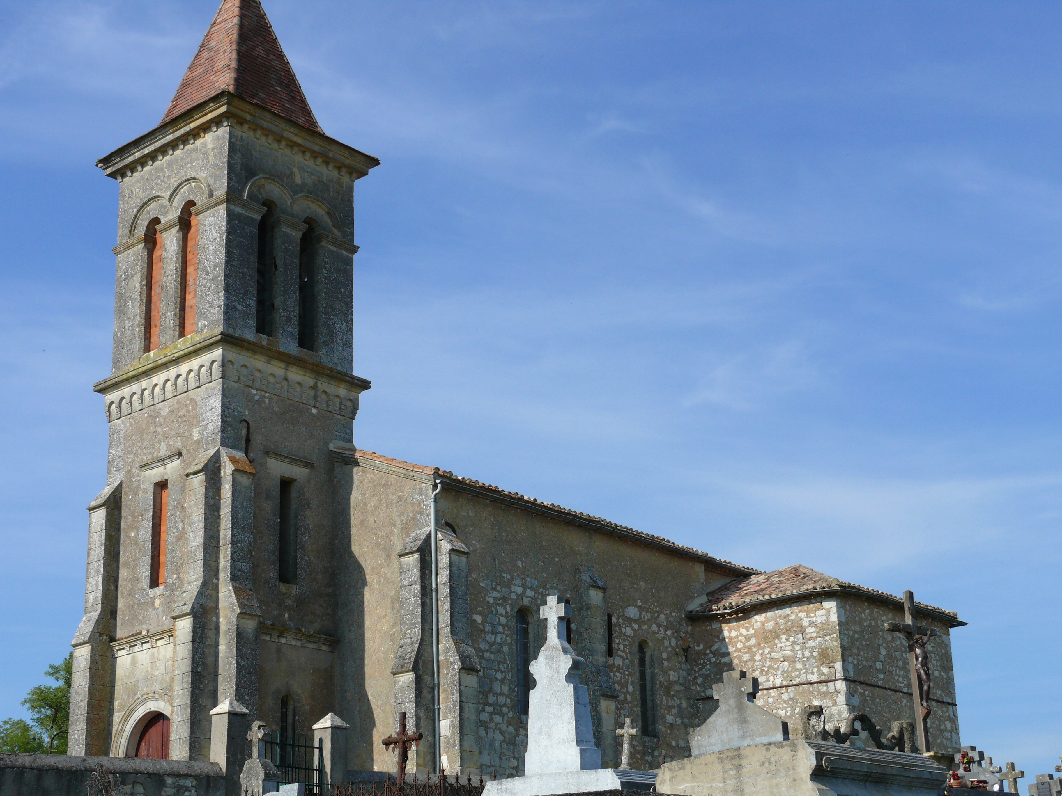 Vergt-de-Biron - Eglise